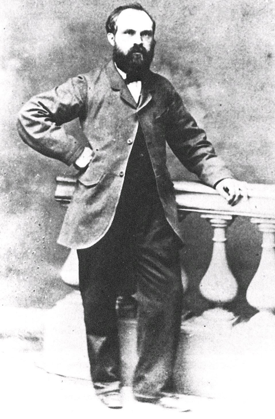 Fotografi av A.O.Vinje i Bergen 1860